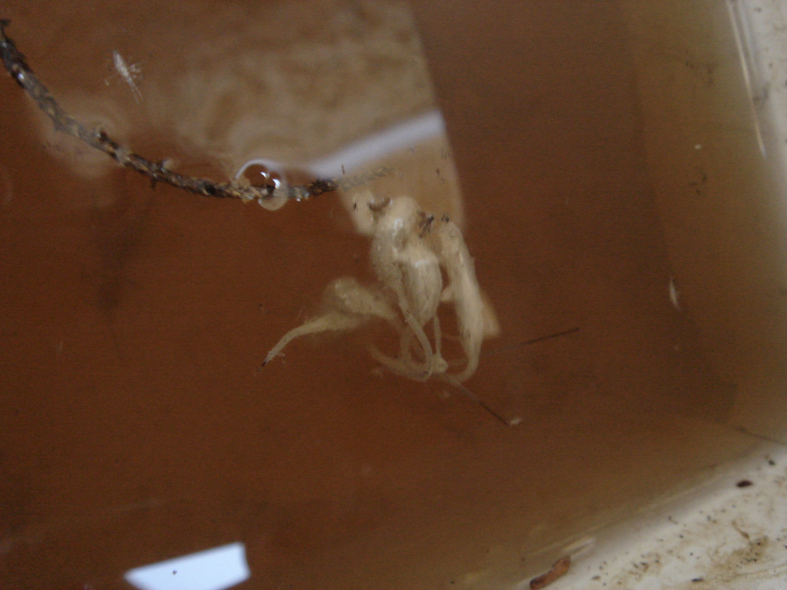 Larve d'éritale